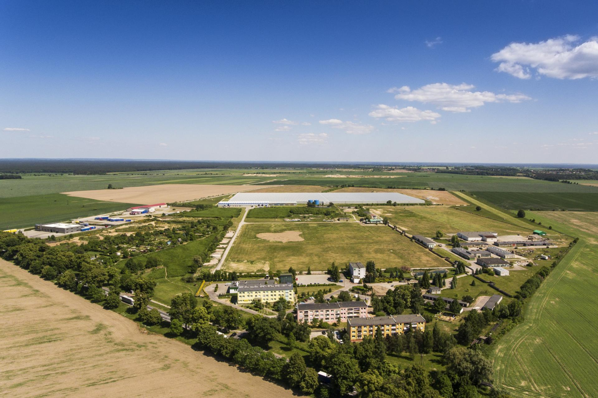 Różanki Szklarnia z lotu ptaka